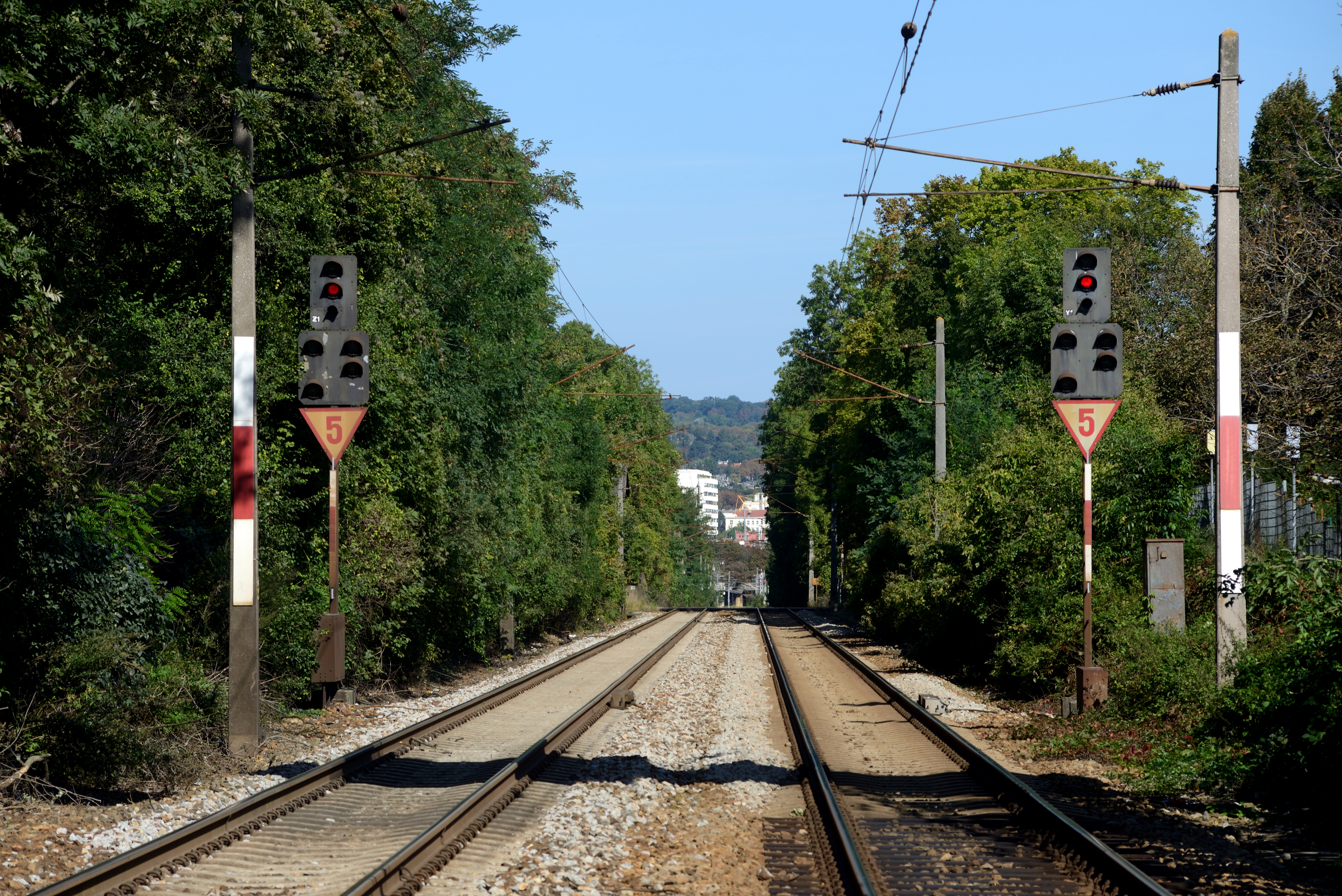 Selbstblock Hütteldorf 2 zwischen Hütteldorf und Speising